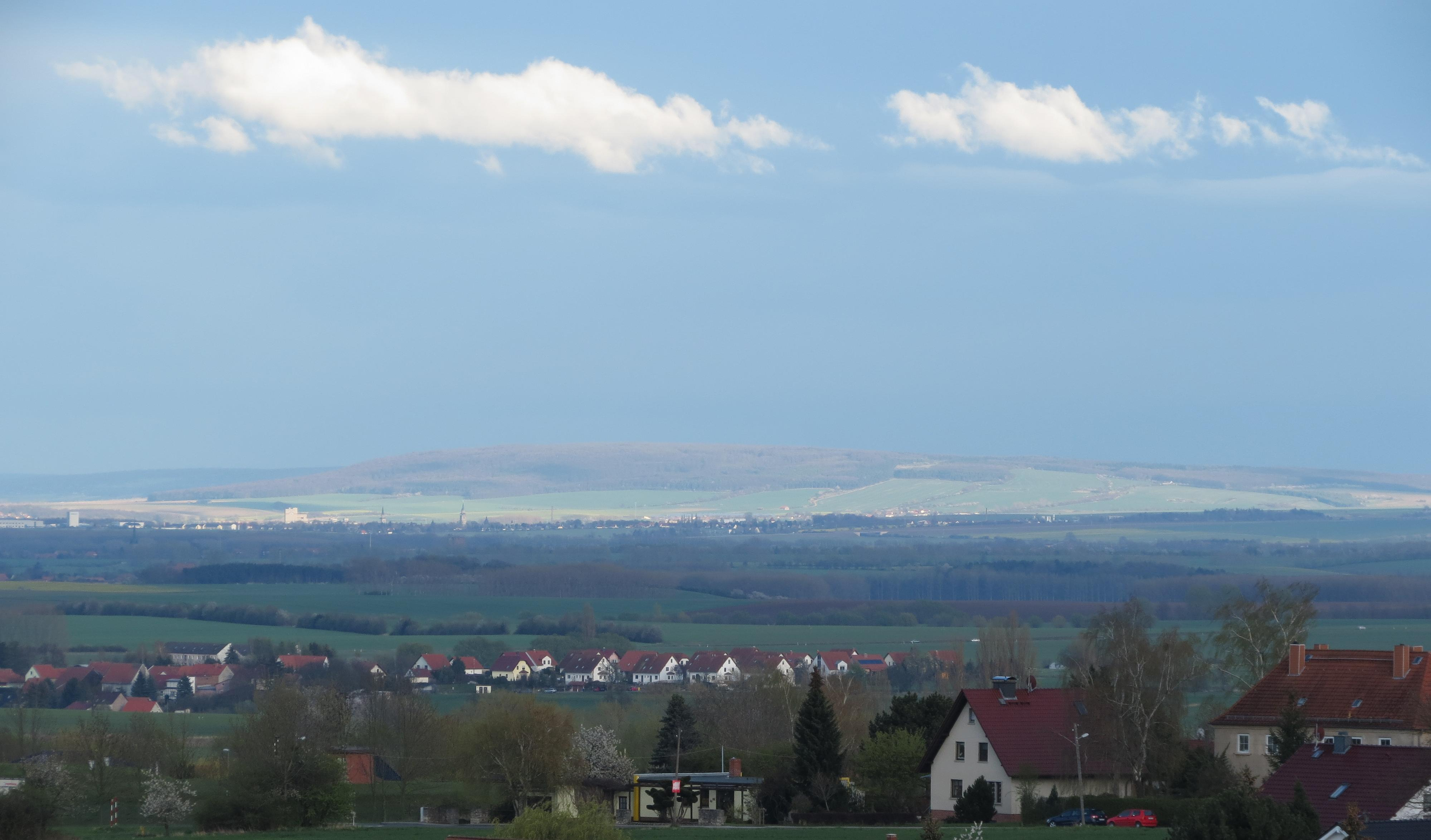 Die Fahnerschen Höhen vom Rand des Mühlhäuser Stadtwaldes aus gesehen. Mit Bad Langensalza vor dem bewaldeten Höhenzug.